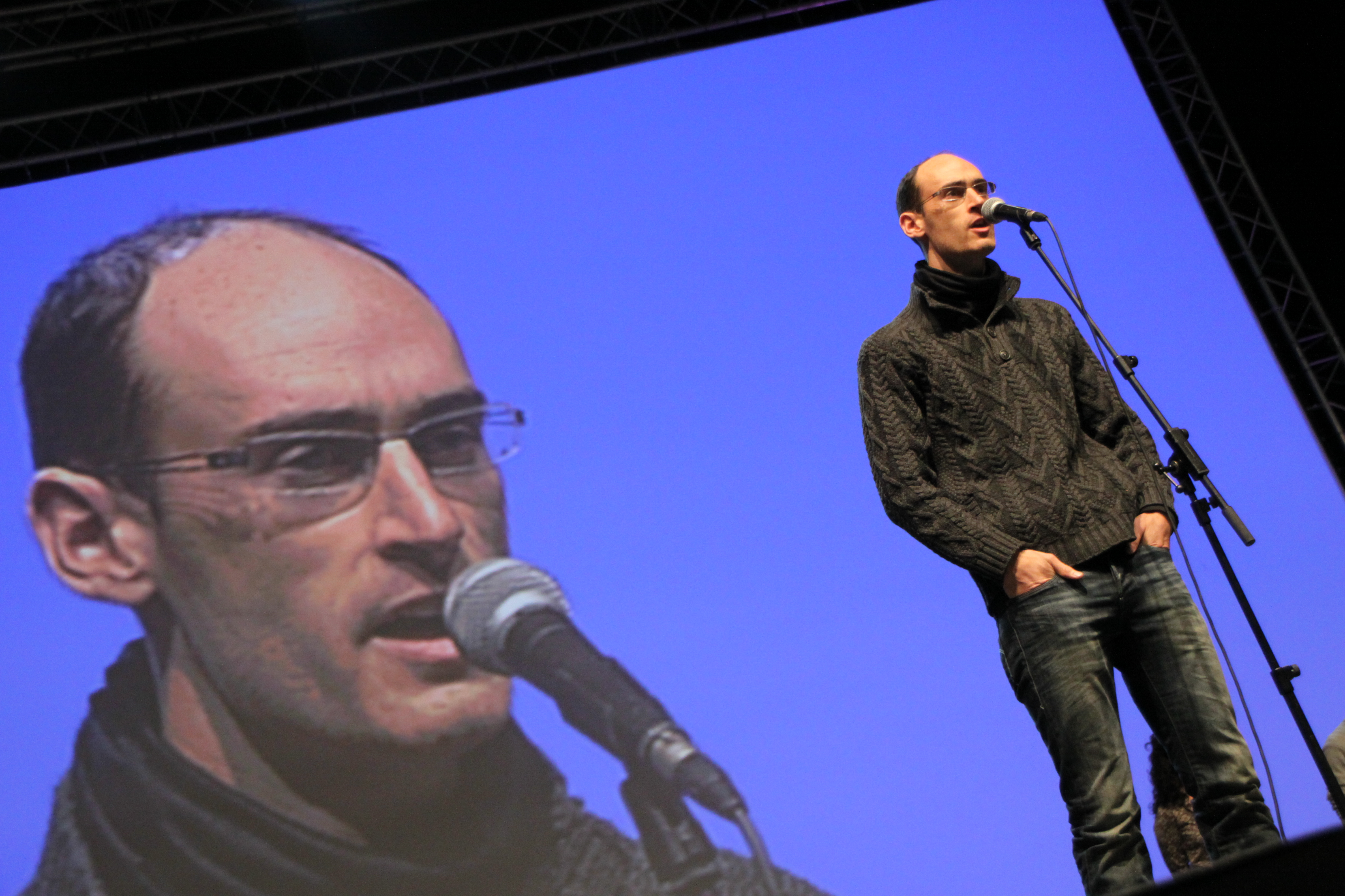 2013ko abenduaren 15ean jokatu zen Barakaldoko BECen Bertsolari Txapelketa Nagusia. Maialen Lujanbio, Aitor Mendiluze, Amets Arzallus, Sustrai Colina, Aitor Sarriegi, Beñat Gaztelumendi, Igor Elortza eta Unai Iturriaga igo ziren oholtzara, 13.500 bertsozaleren aurrean. Bertsolari Txapelketa Nagusia 2017. Egilea: Uribe Kosta eta Erandioko agerkaria.